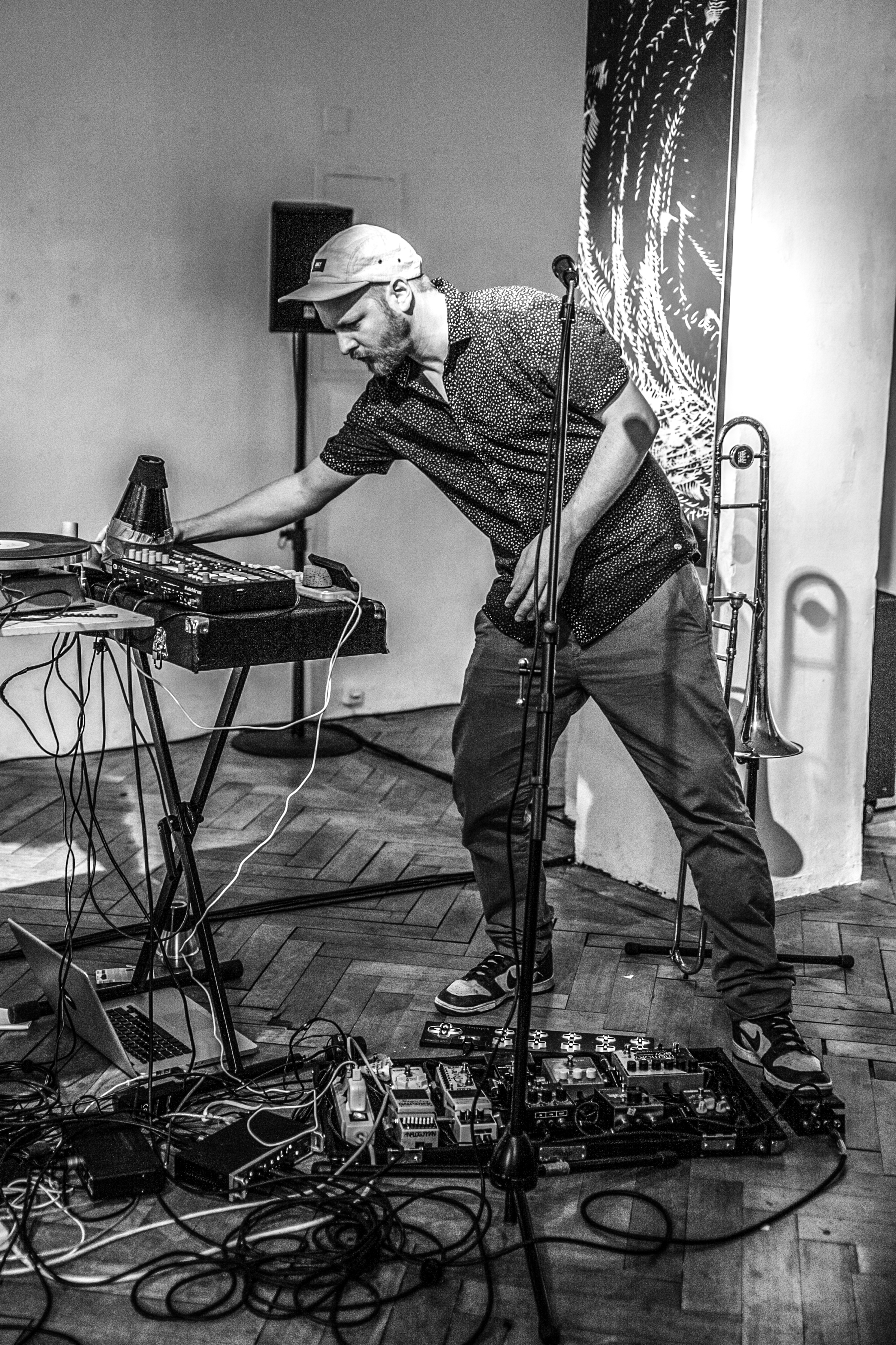 Musiker Simon Petermann während eines Konzertes